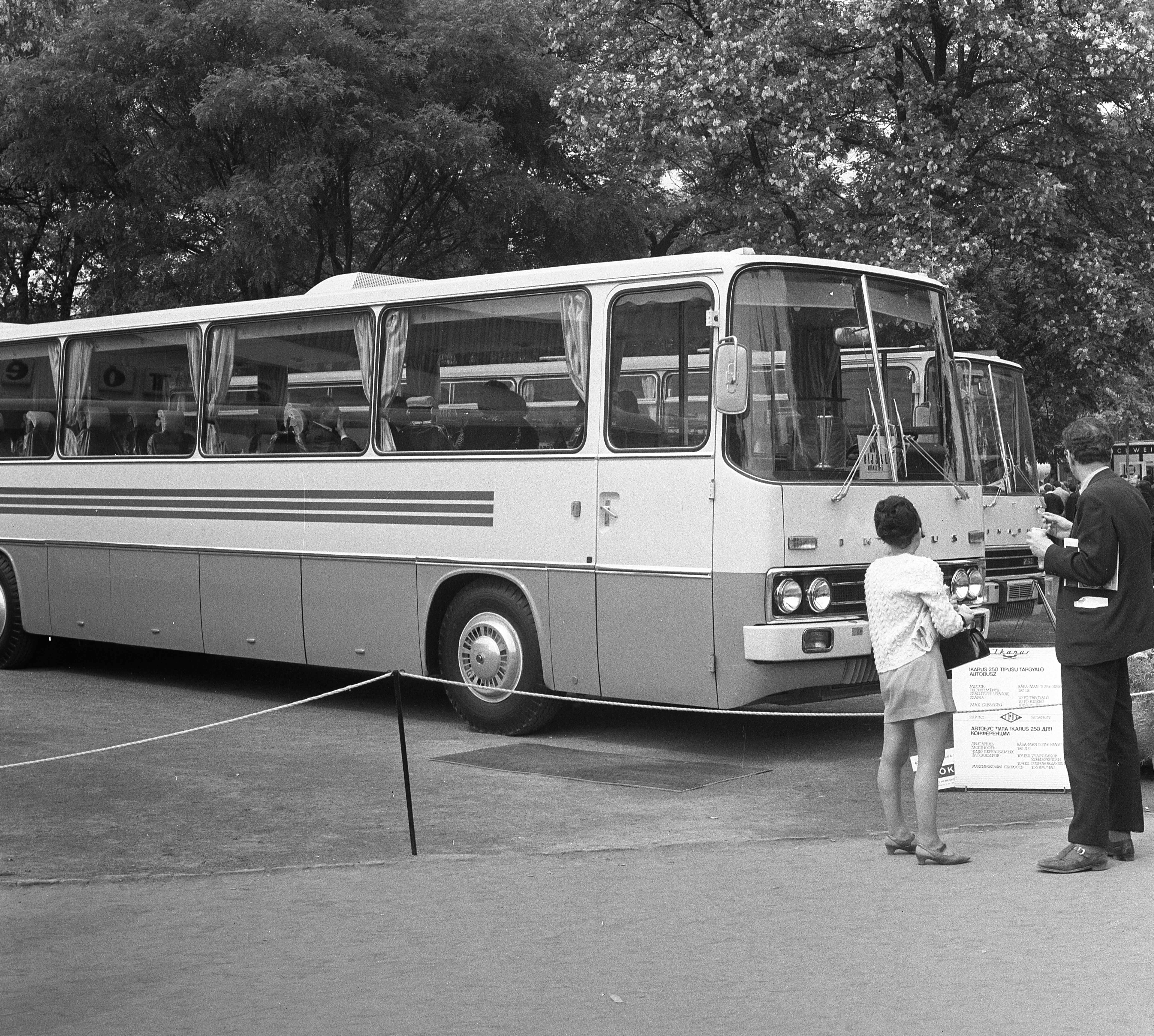 Ikarus 250 típusú tárgyaló autóbusz. Városliget, Budapesti Nemzetközi Vásár, 1970. május 22-június 1. Location: Hungary, Budapest XIV. Tags: Budapest, Ikarus-brand, exhibition Title: Ikarus 250 típusú tárgyaló autóbusz.